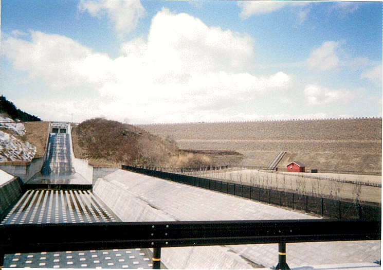 Dam